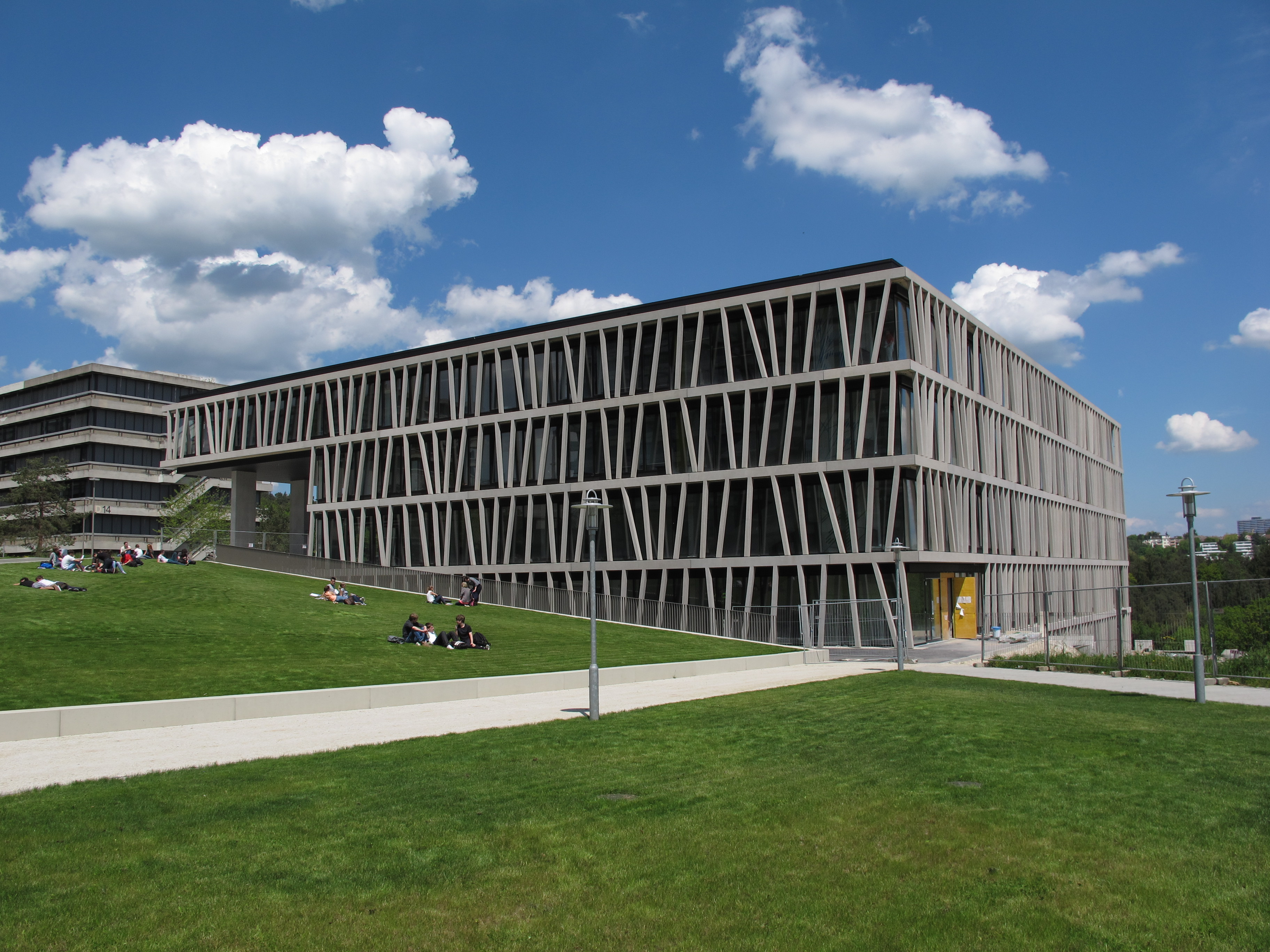 Morgenstelle mit Gebäude ZMBP.